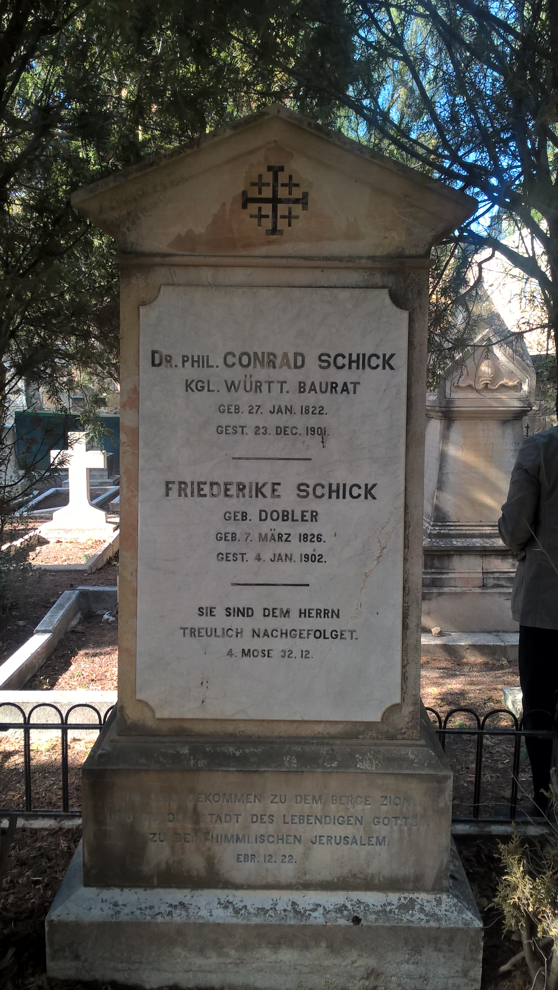 Conrad Schick (Bitz *27. Januar 1822-23. Dezember 1901* Jerusalem) u. Friederike Dobler, verh. Schick (7. März 1826-4. Januar 1902), Grab auf dem Zionsfriedhof Jerusalem